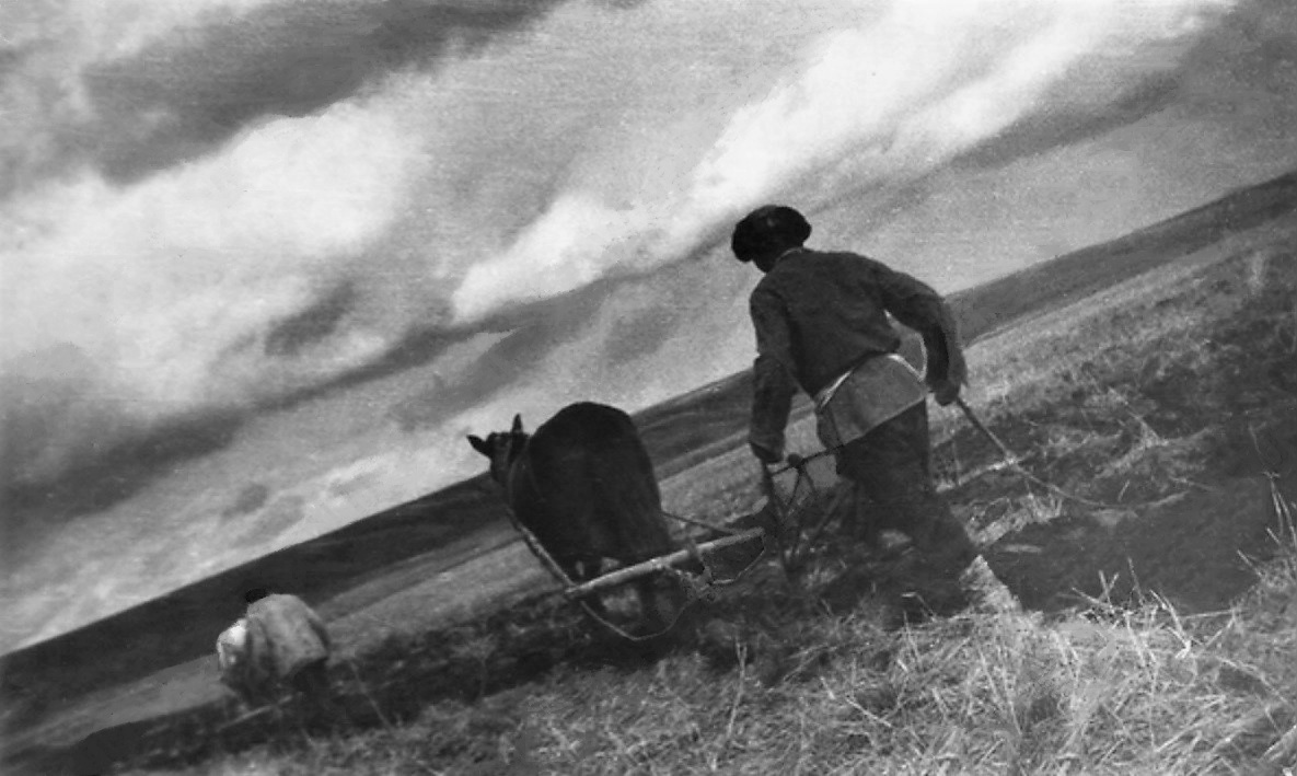 Подъем пара в колхозе Кызыл-иль (Кзыль-Иль)